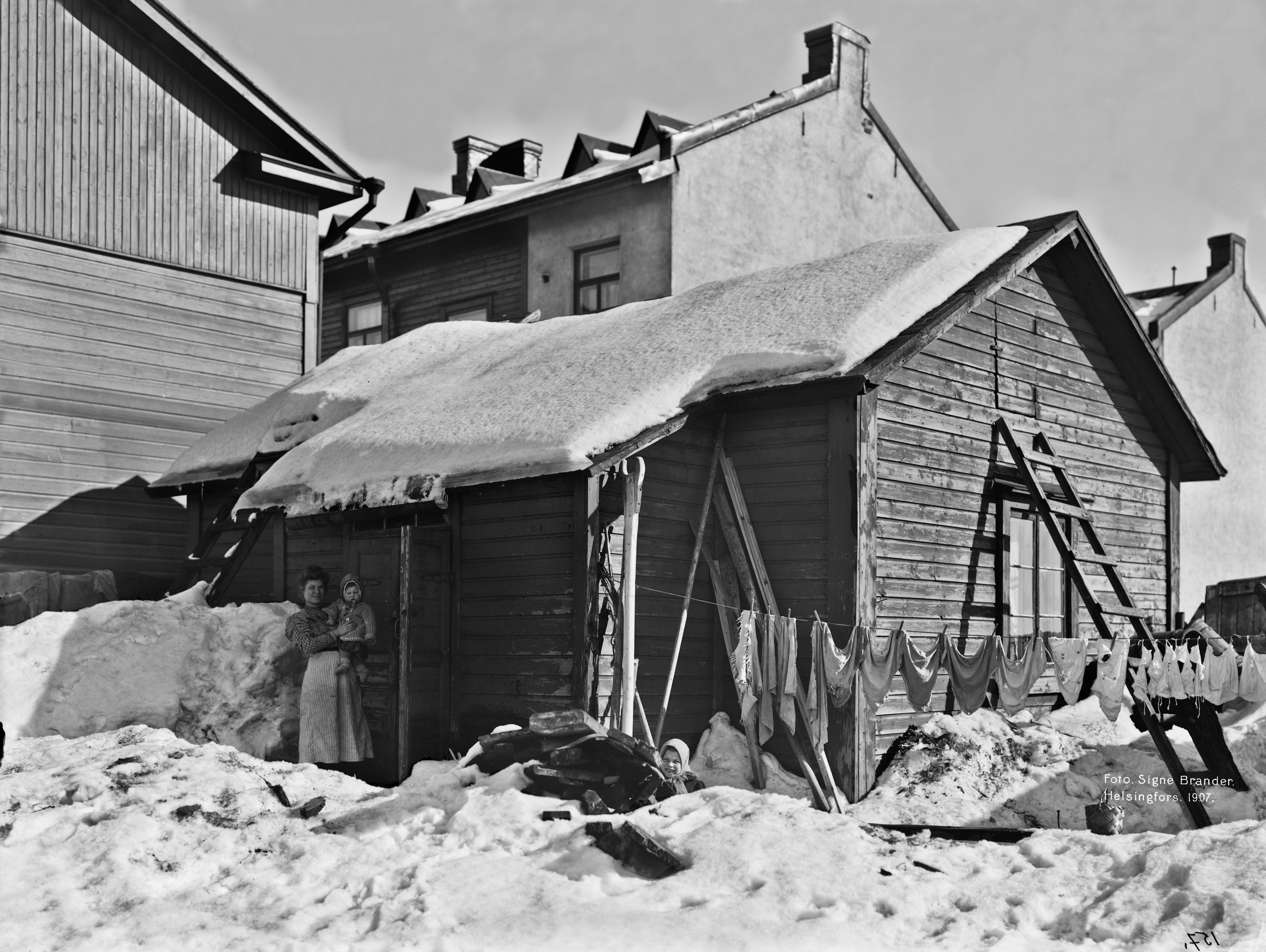 Munkkisaarenkatu 14, pihan puolelta.; negatiivi ja vedos, lasi paperi pahvi, mv